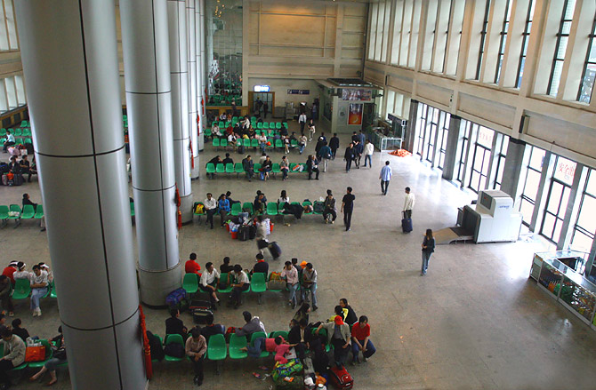 Xining railway station, Xining, Qinghai, China